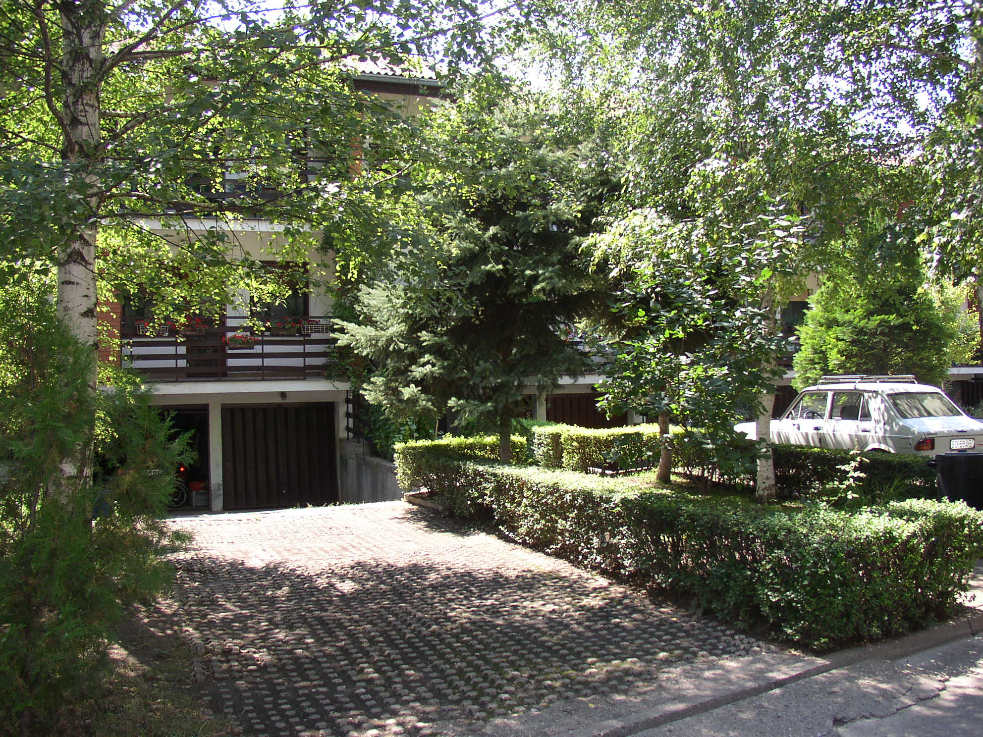 Autor Laslo Varga